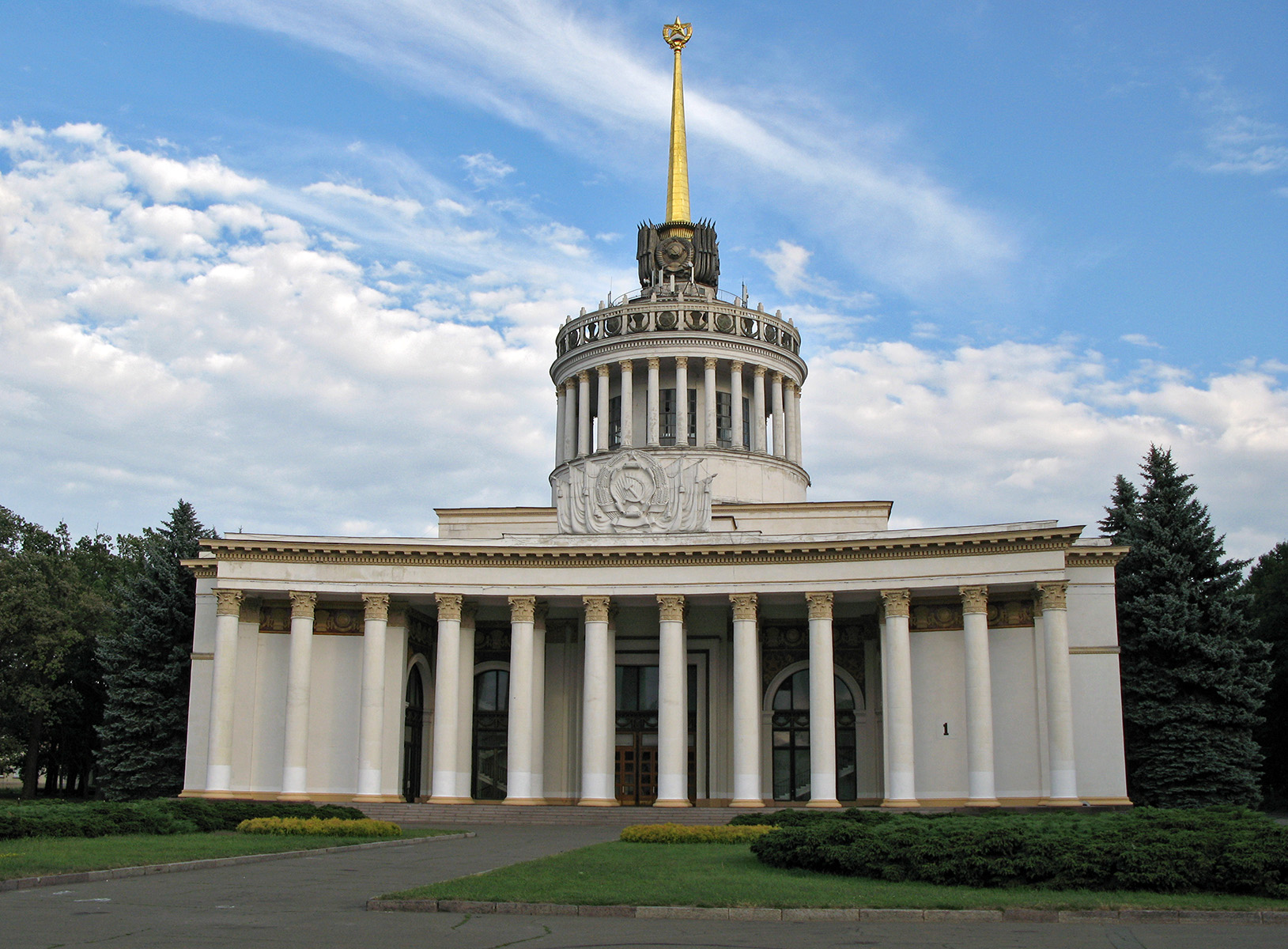 Експоцентр